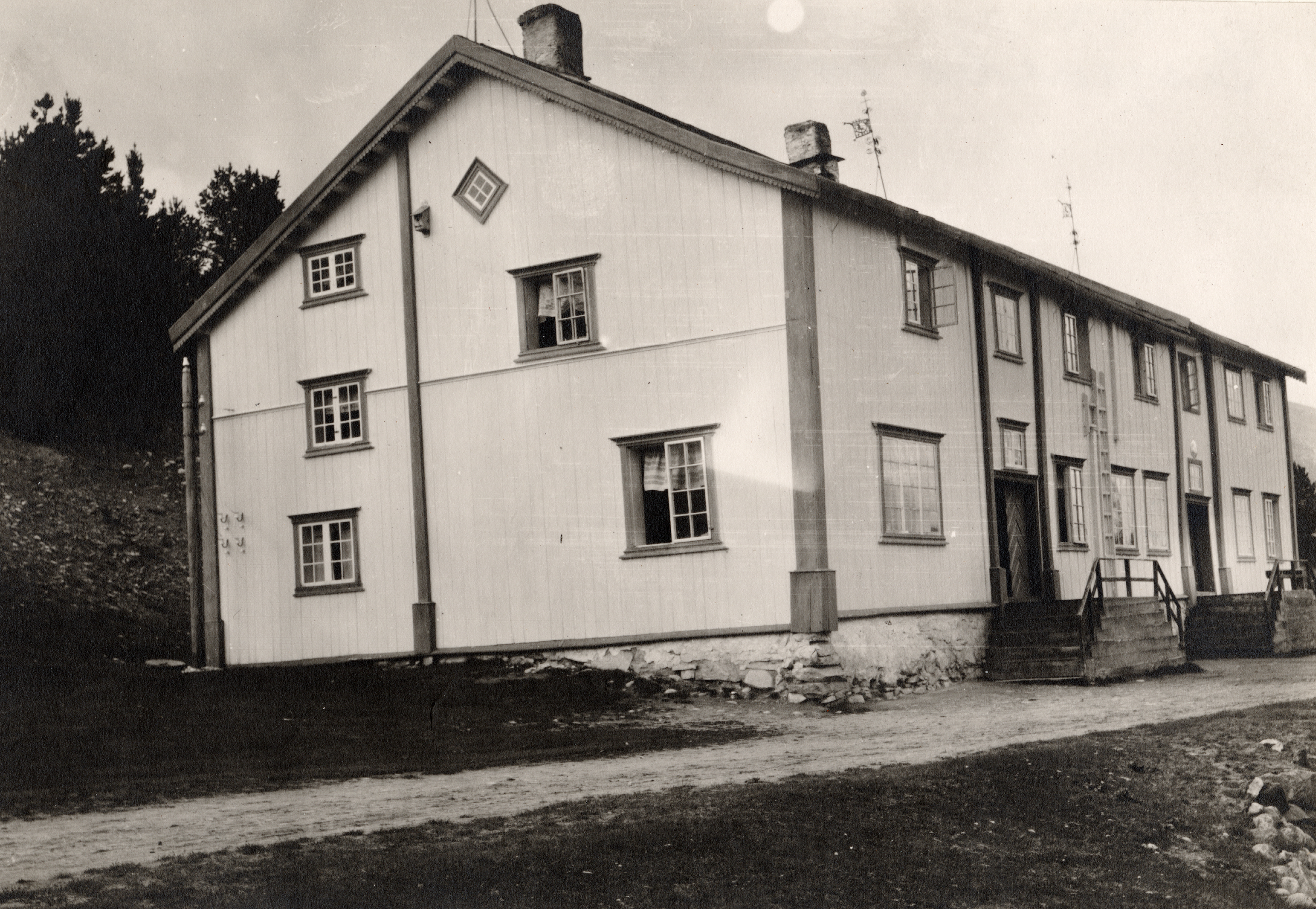 Lesjaverk i Lesja, Oppland